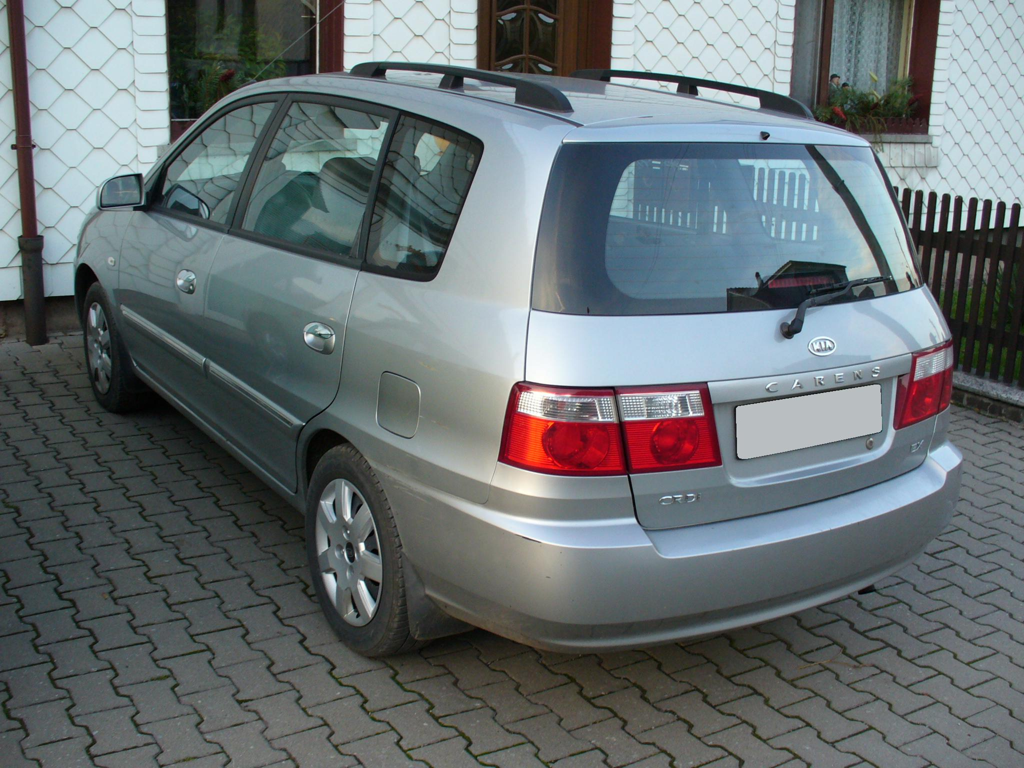 Kia Carens Heck